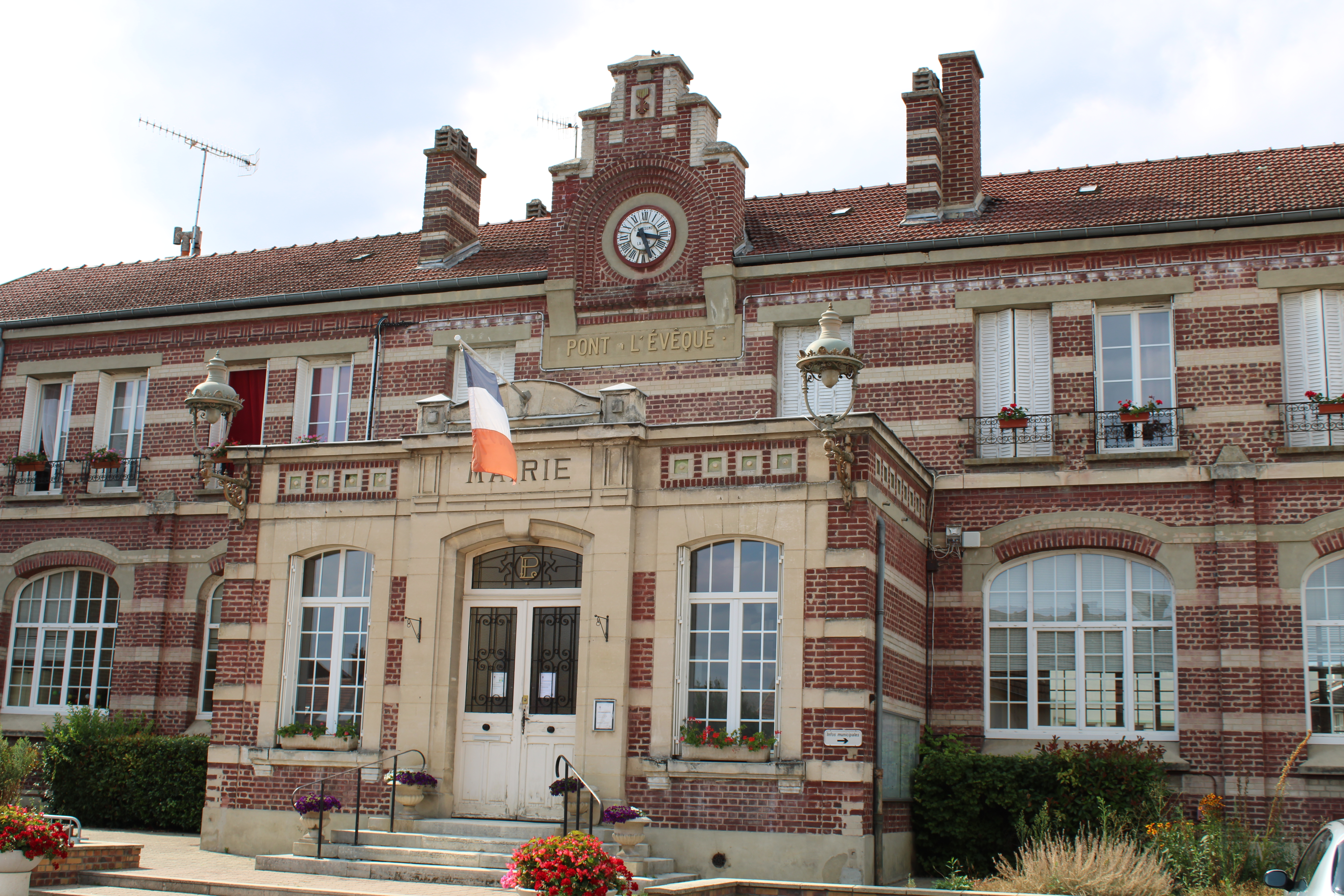 La mairie